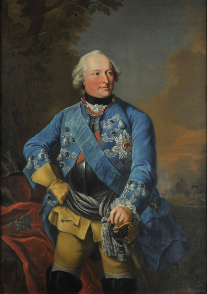 Georges Louis de Holstein Gottorp